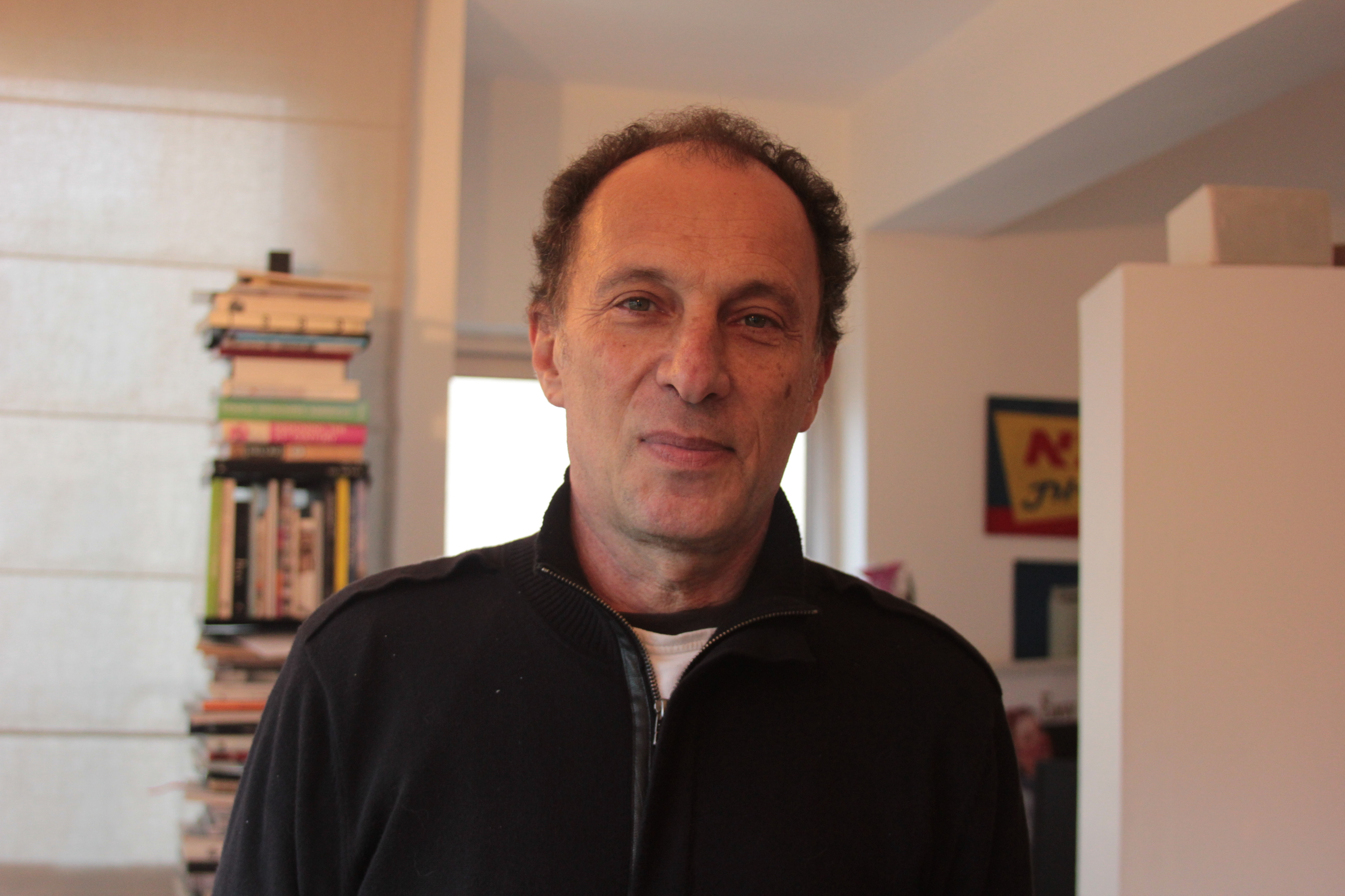 אריה ברקוביץ